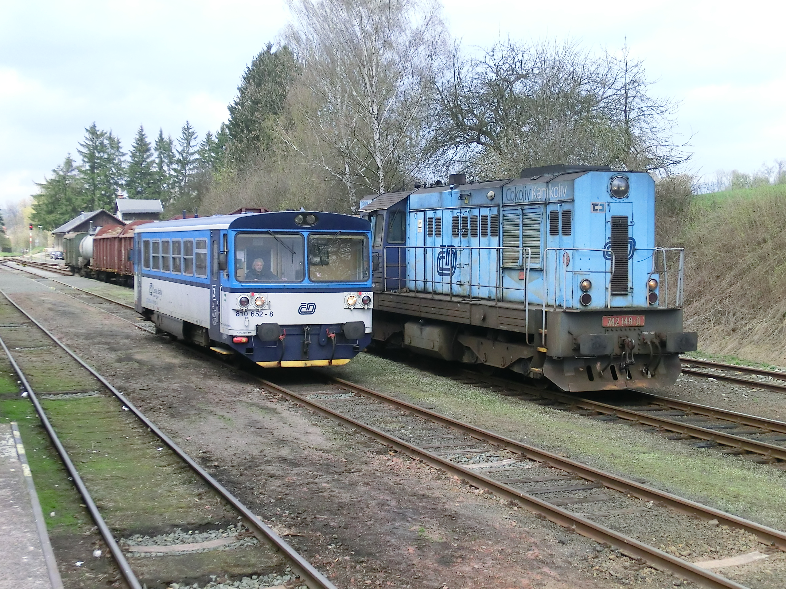 Manipulační vlak z Jablonce nad Jizerou do Martinic, zachycený na nádraží v Jilemnici. Soupravu vede lokotraktor 742.148 (vyroben v ČKD Praha v roce 1979), v Jilemnici se k ní připojoval další vagon s dřevem a čekalo se na předjetí osobním vlakem MOs 15507 v podobě motoráčku 810.652.